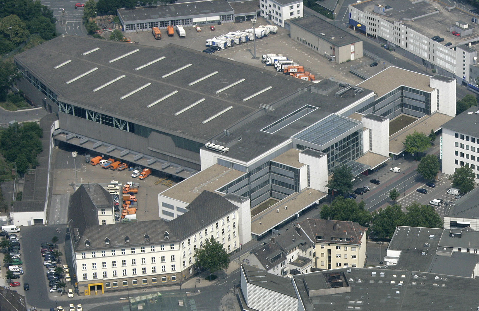 Luftbildaufnahme Hamm